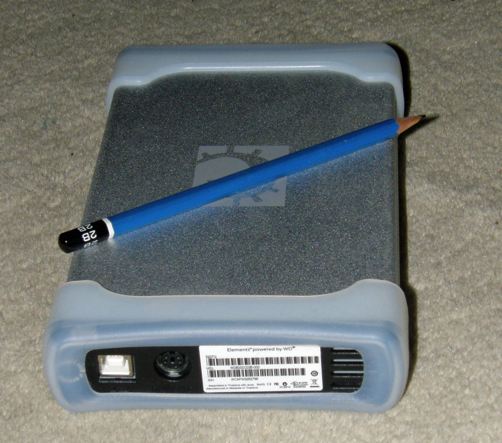 Extern Festplack.